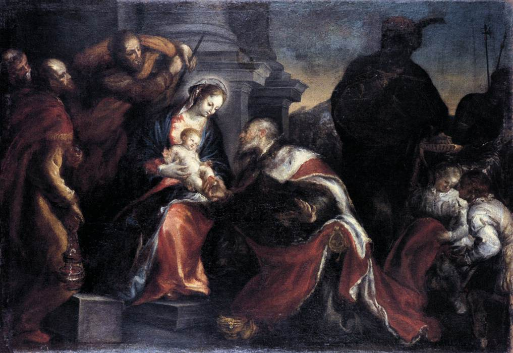 La obra representa el momento en que el Niño Jesús fue adorado por los tres Reyes Magos.